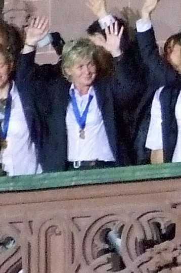 Silvia Neid, während des Empfanges der Fußball-Weltmeisterinnen auf dem Römerbalkon in Ffm